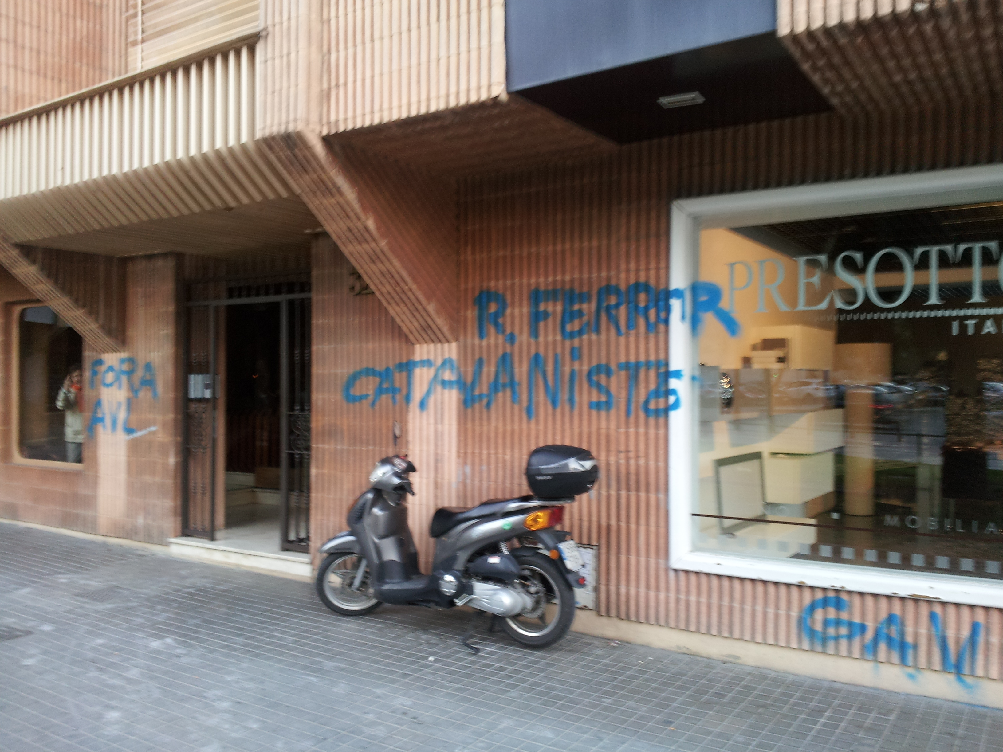 Atac del GAV a la casa de Ramon Ferrer, president de l'Acadèmia Valenciana de la Llengua, patit la matinada del 22 al 23 de maig de 2013.